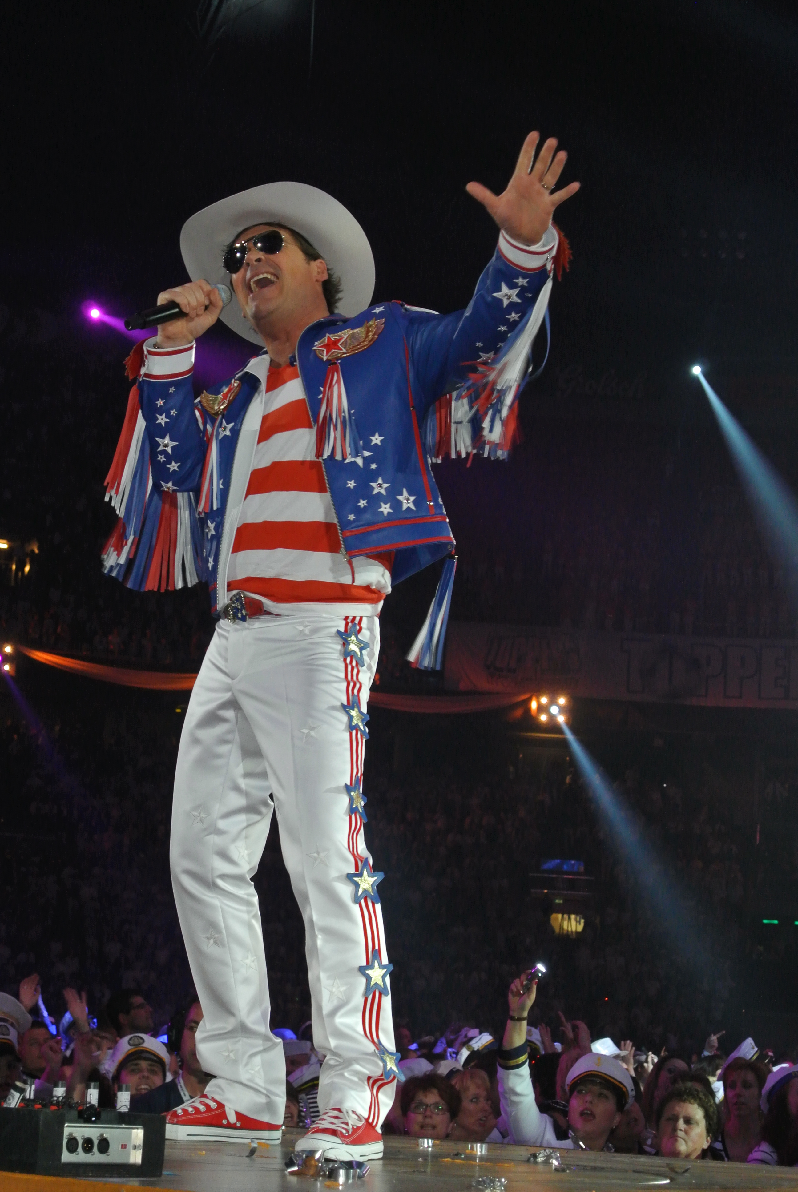 Jeroen van der Boom Toppers